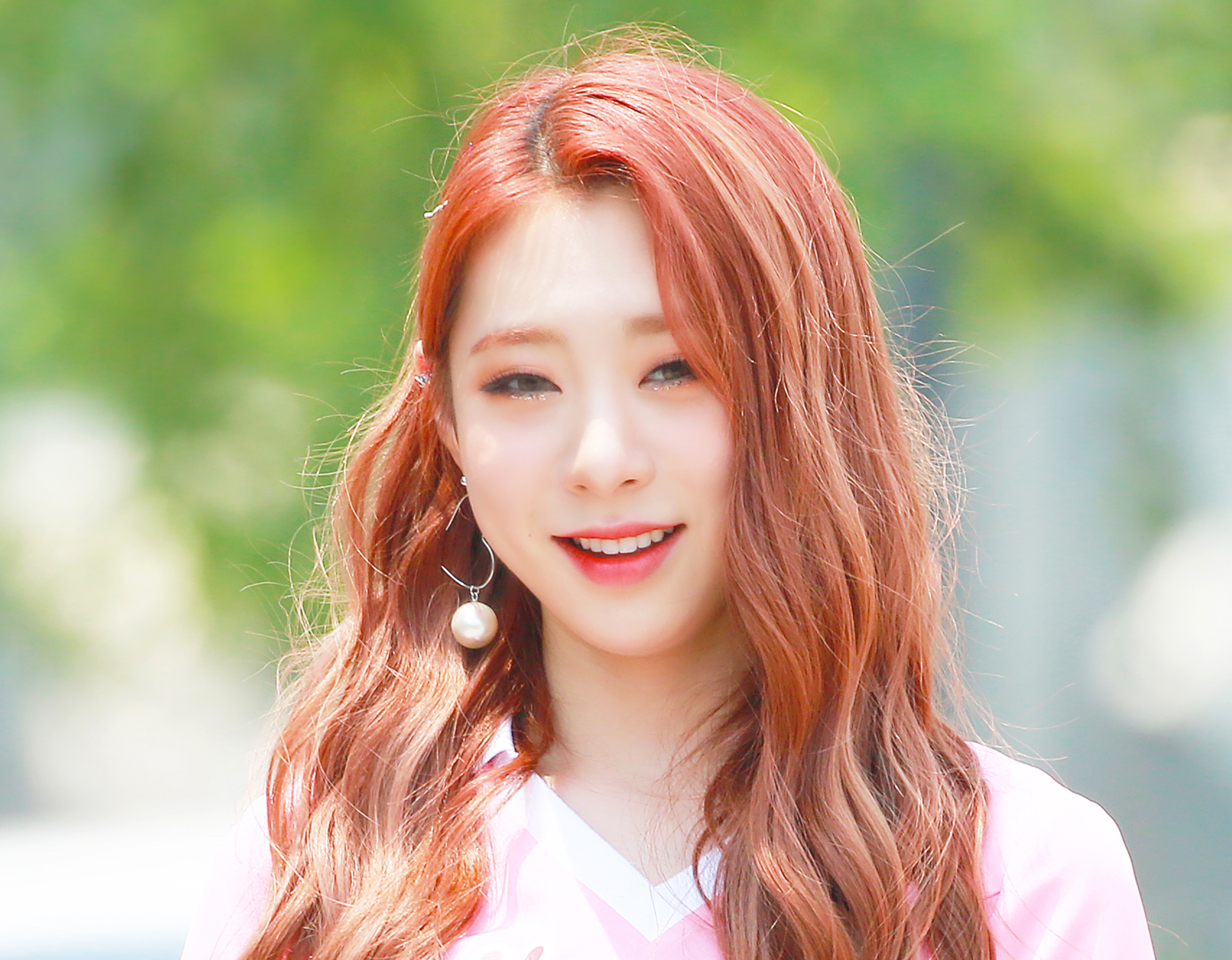 170617 유연정 미니팬미팅